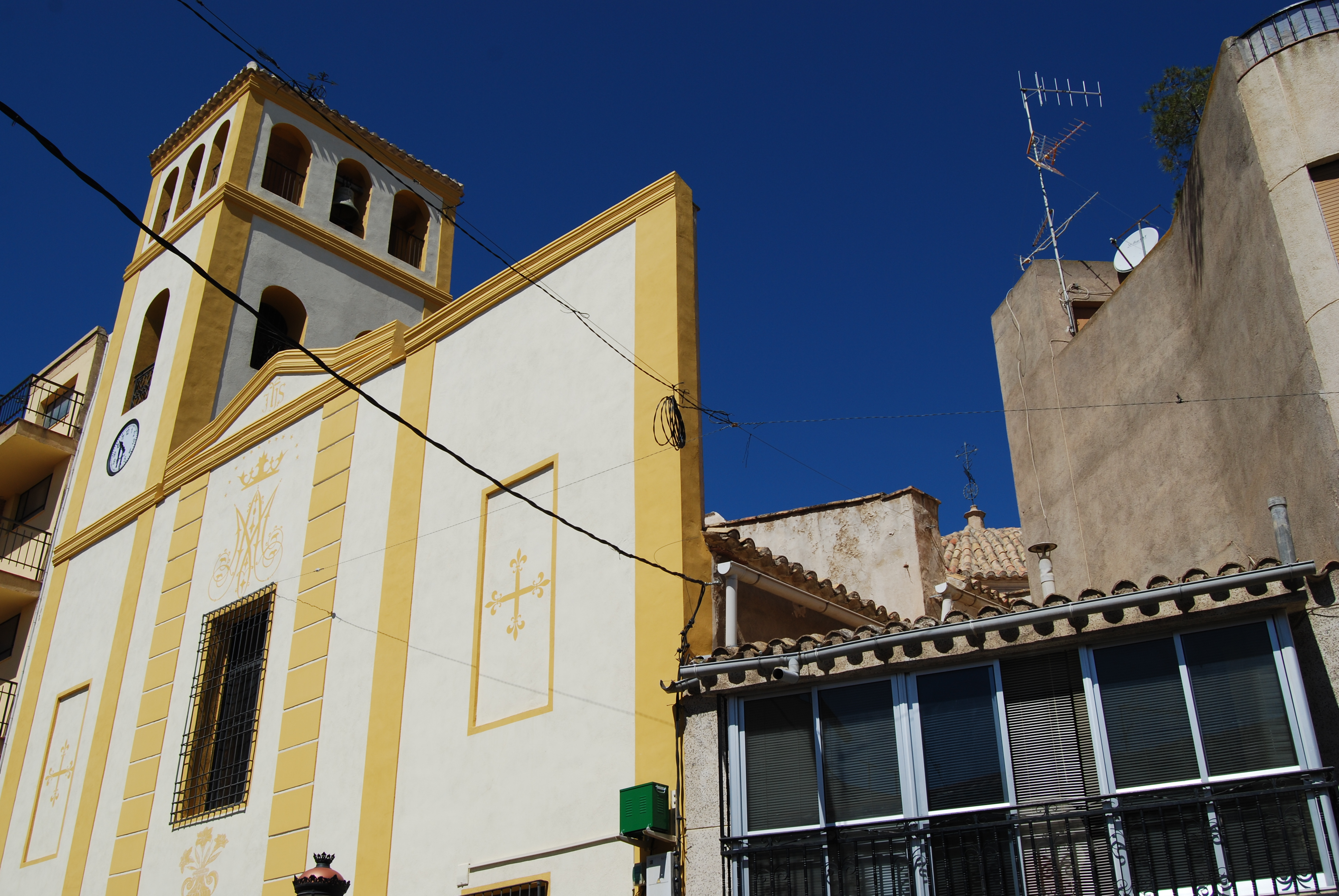 Vista del lateral de la Iglesia de Nuestra Señora del Rosario, de Puerto Lumbreras